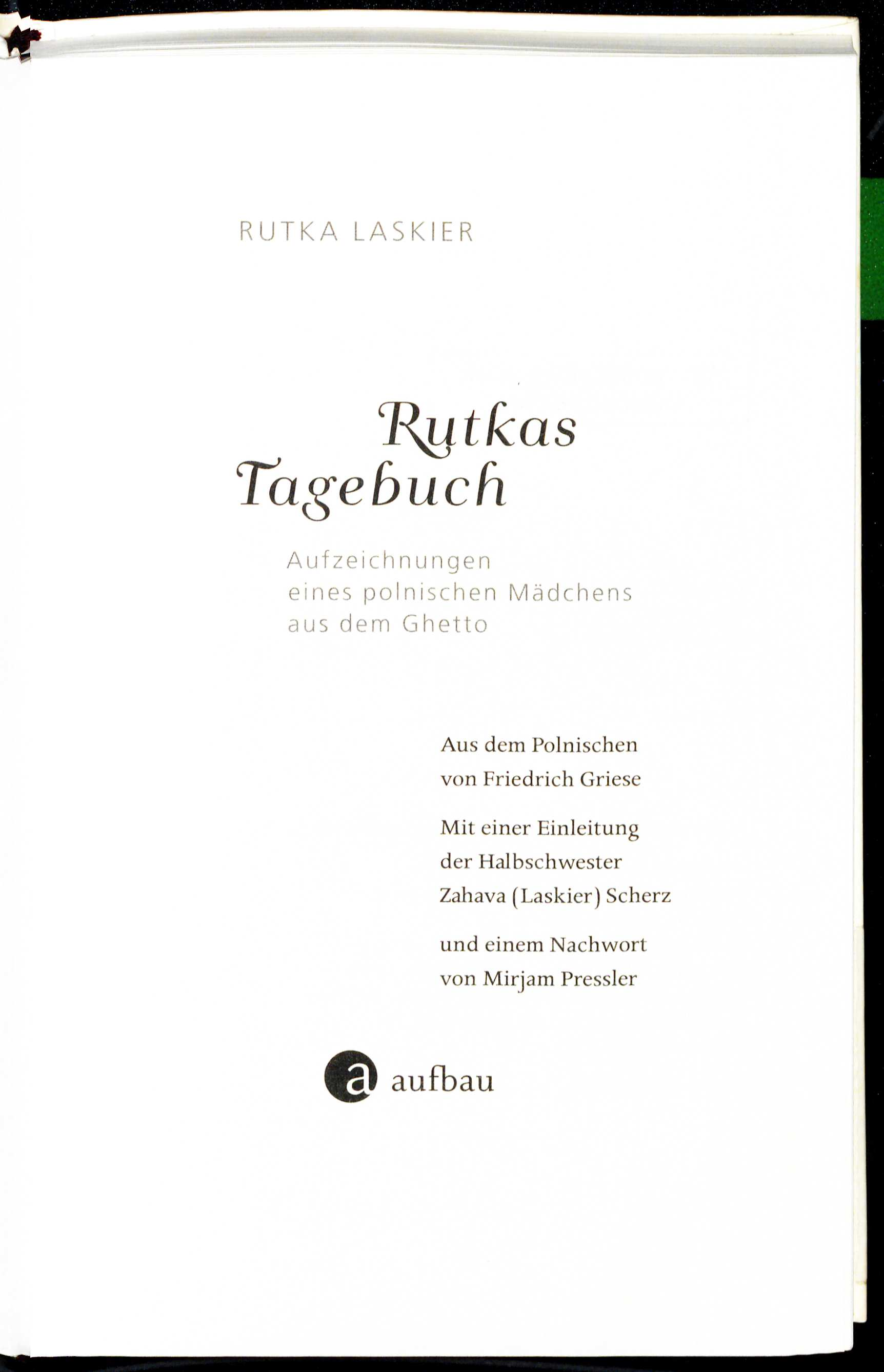 Rutka Laskier Rutkas Tagebuch 2011 title